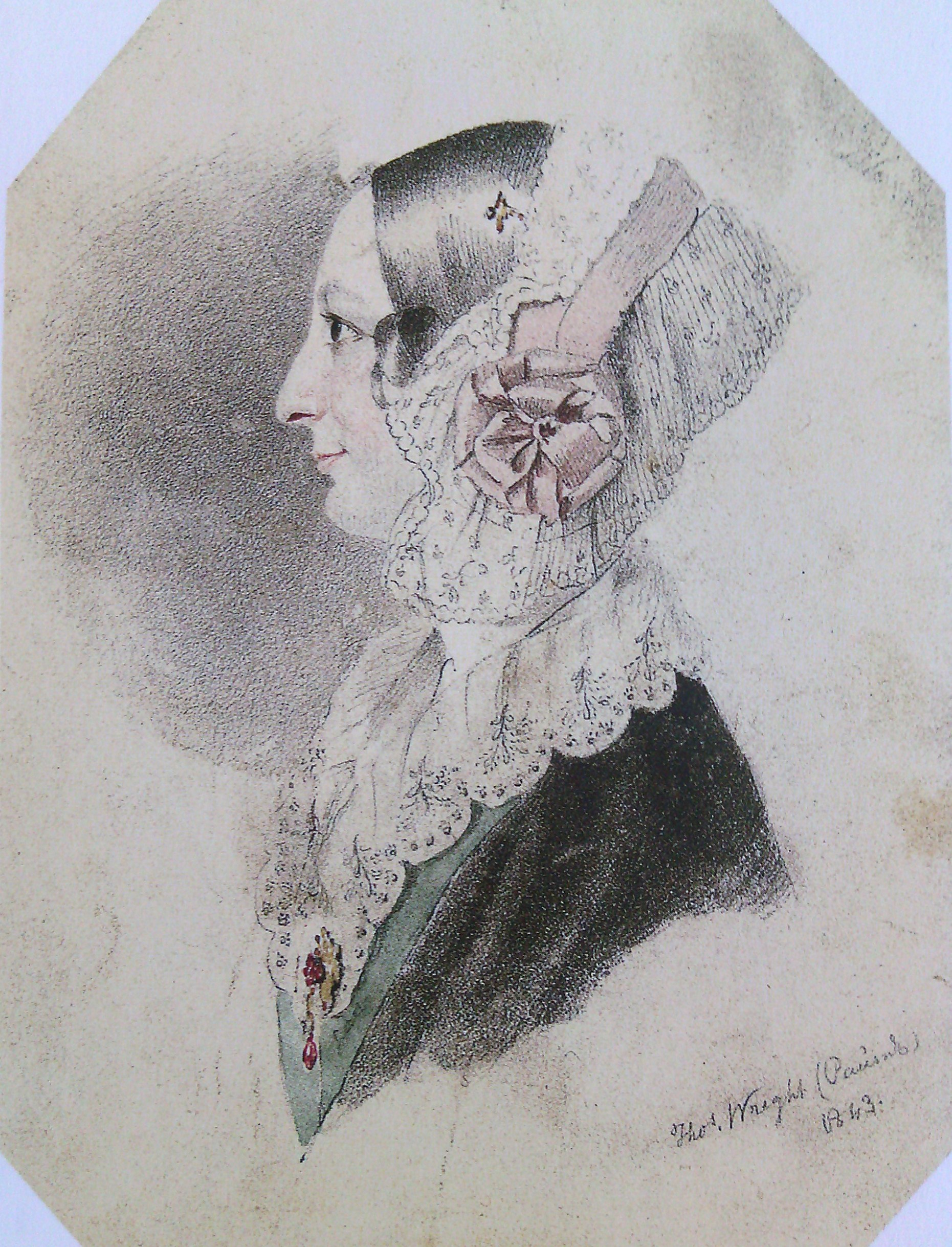 Портрет госпожи Екатерины Иосифовны Мейнгардт